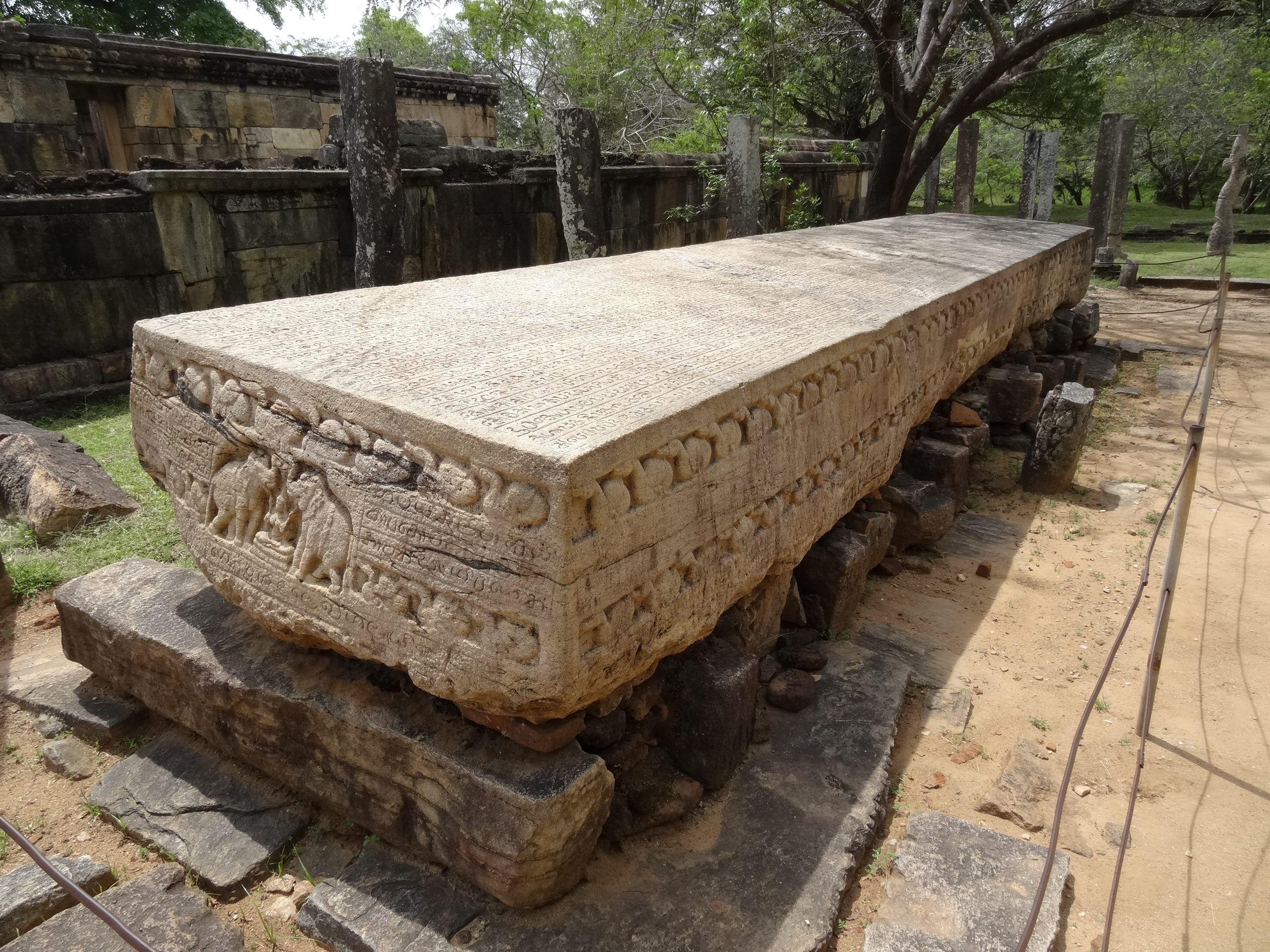 Gal Potha